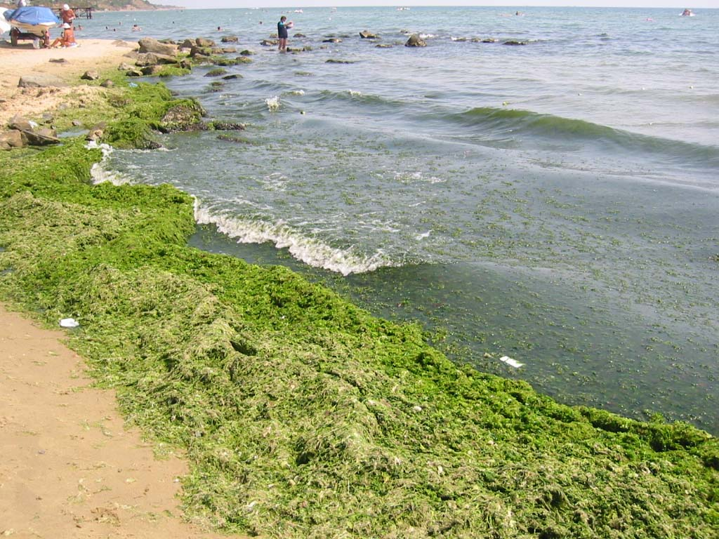 Wlas bank